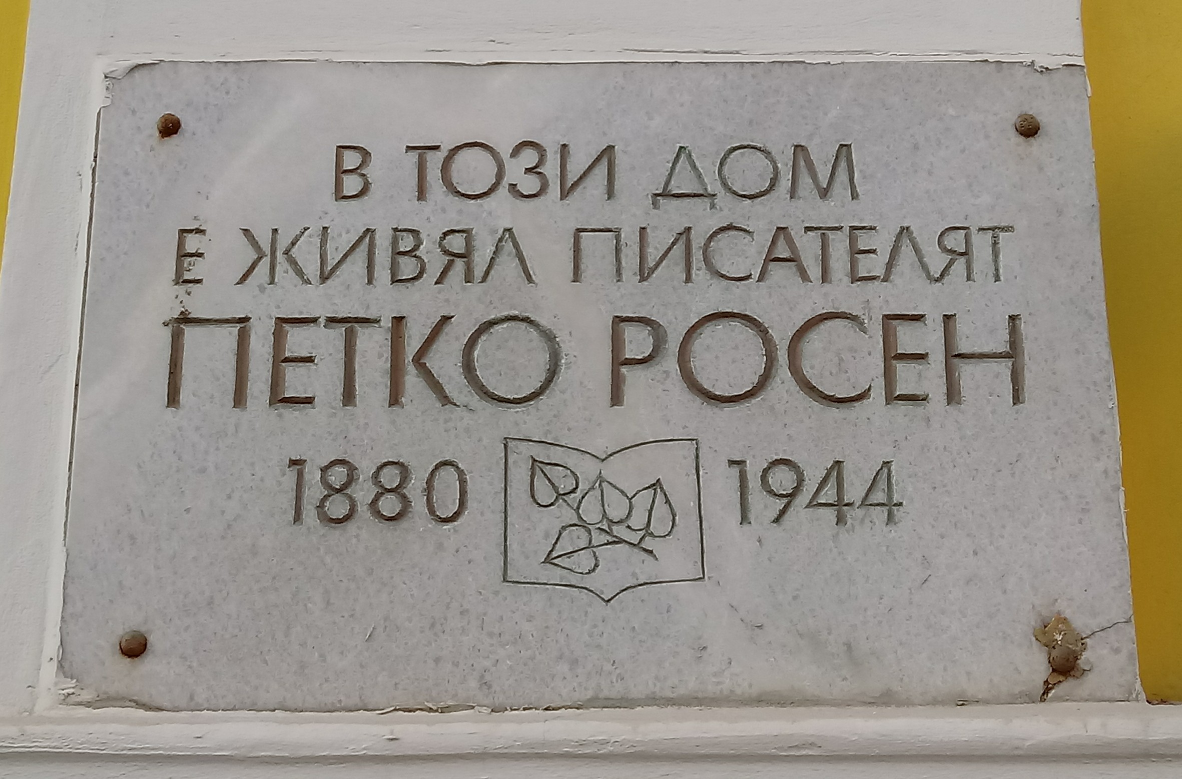 Petko Rosen memorial plaque, 41 Tsar Asen Str., Burgas